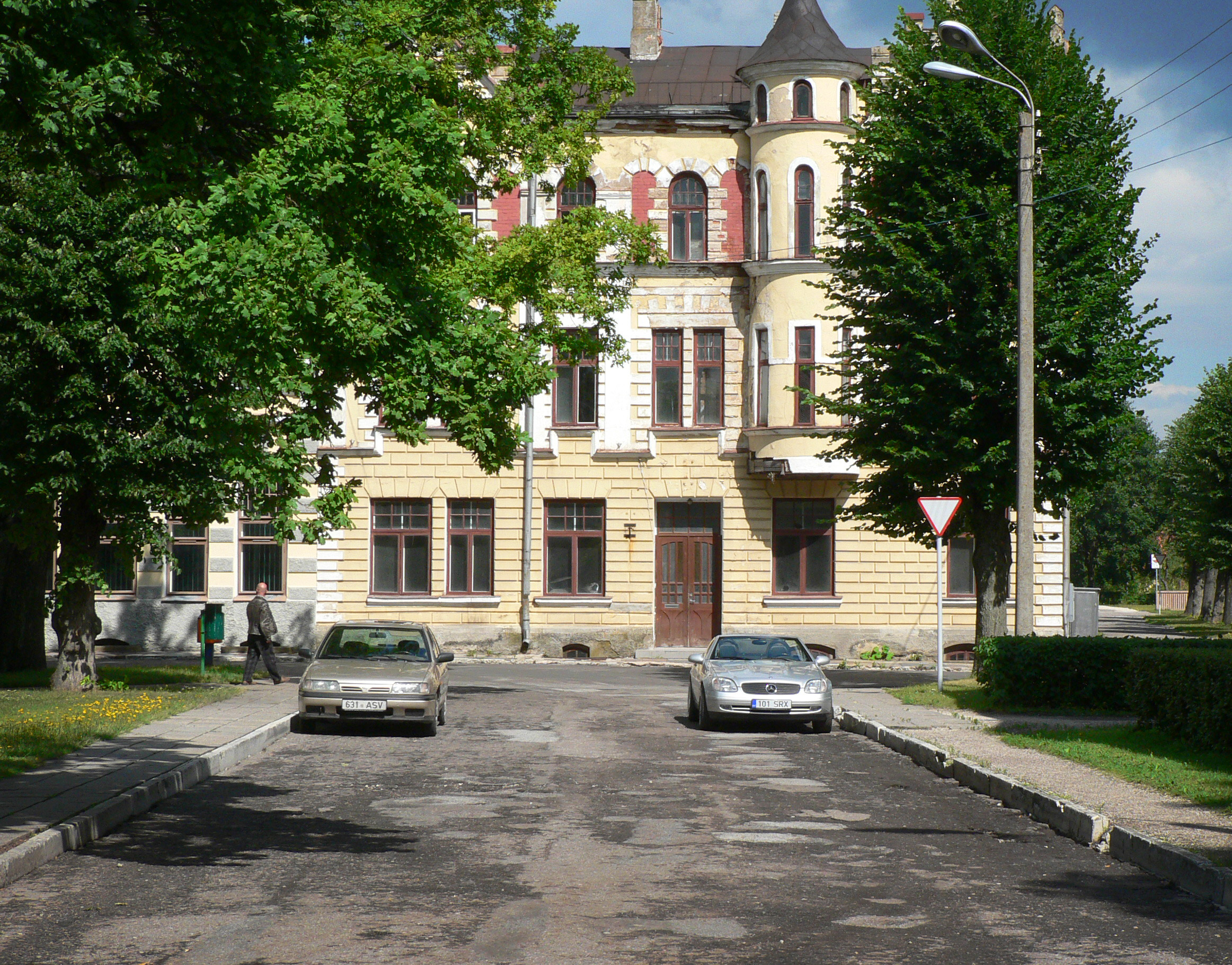 Endine Viljandi kultuurikooli hoone, J. Laidoneri plats 8.